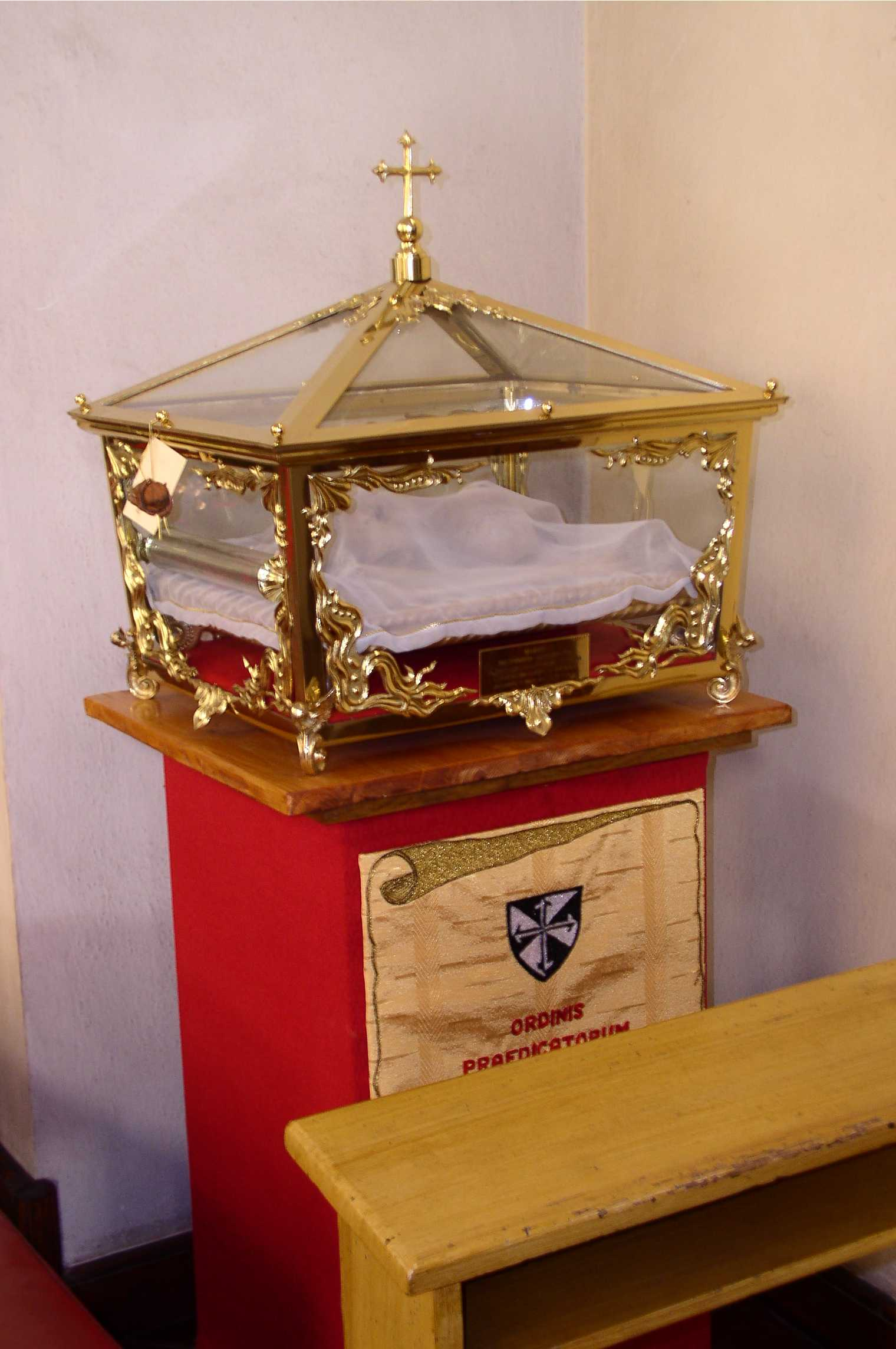 Ząbkowice Śl., ul. Grunwaldzka 8 - kościół p.w. Podwyższenia Krzyża w zespole klasztornym dominikanów z XIV-XVIII w. (zabytek nr A/1725/730)